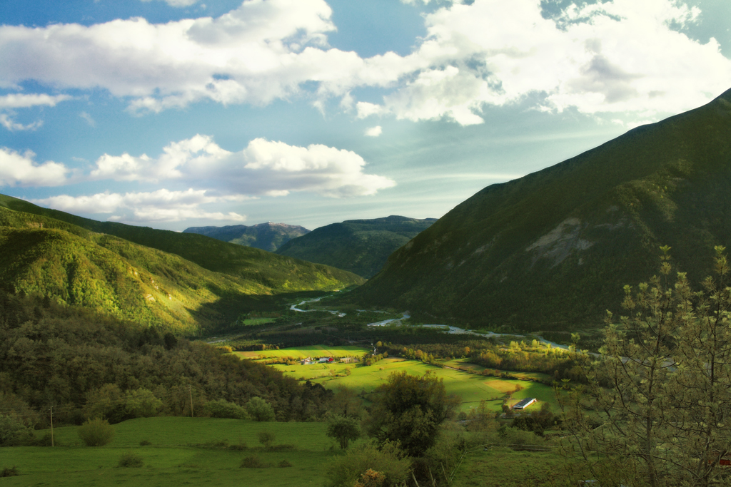 El Valle de Broto desde Buesa.